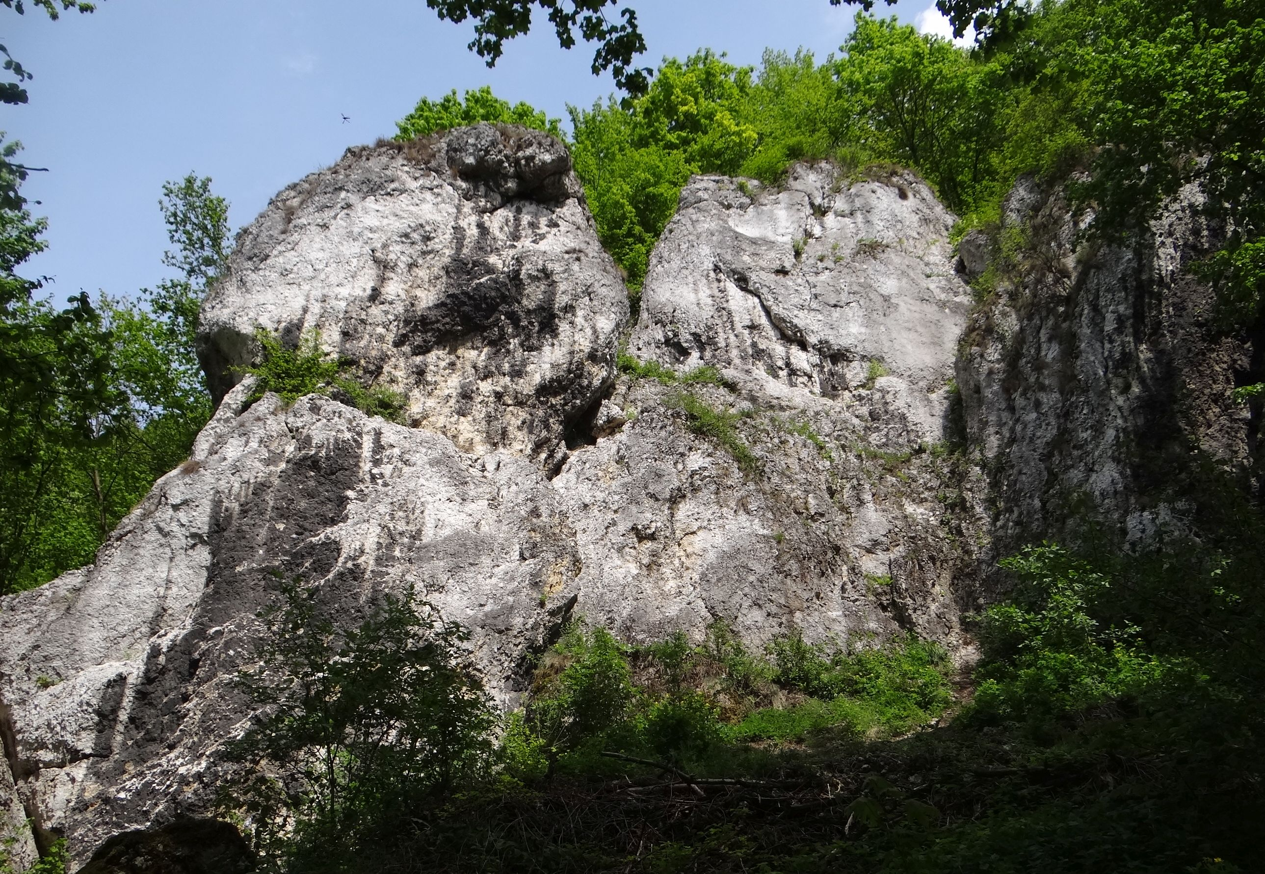 Czarna Ścianka w zboczach Doluny Kobylańskiej